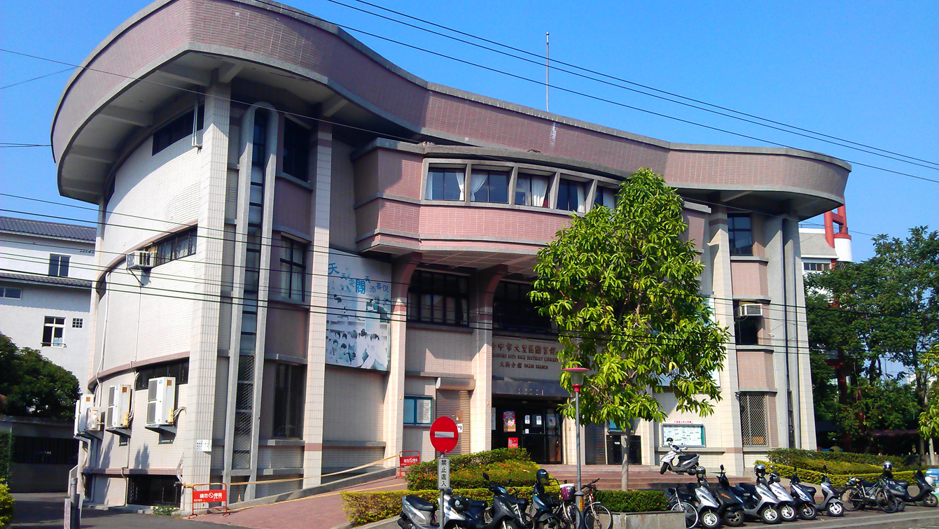 中文（台灣）: 大里區圖書館大新分館